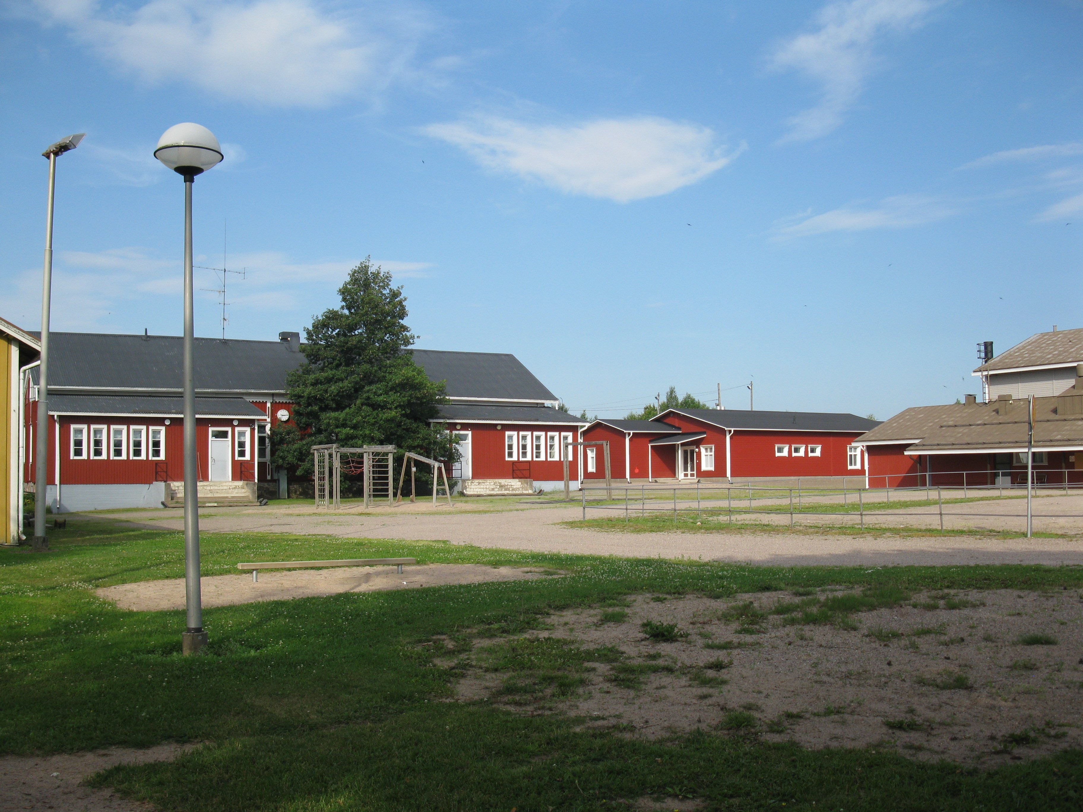 Komisuon koulu Kiikalassa Salossa